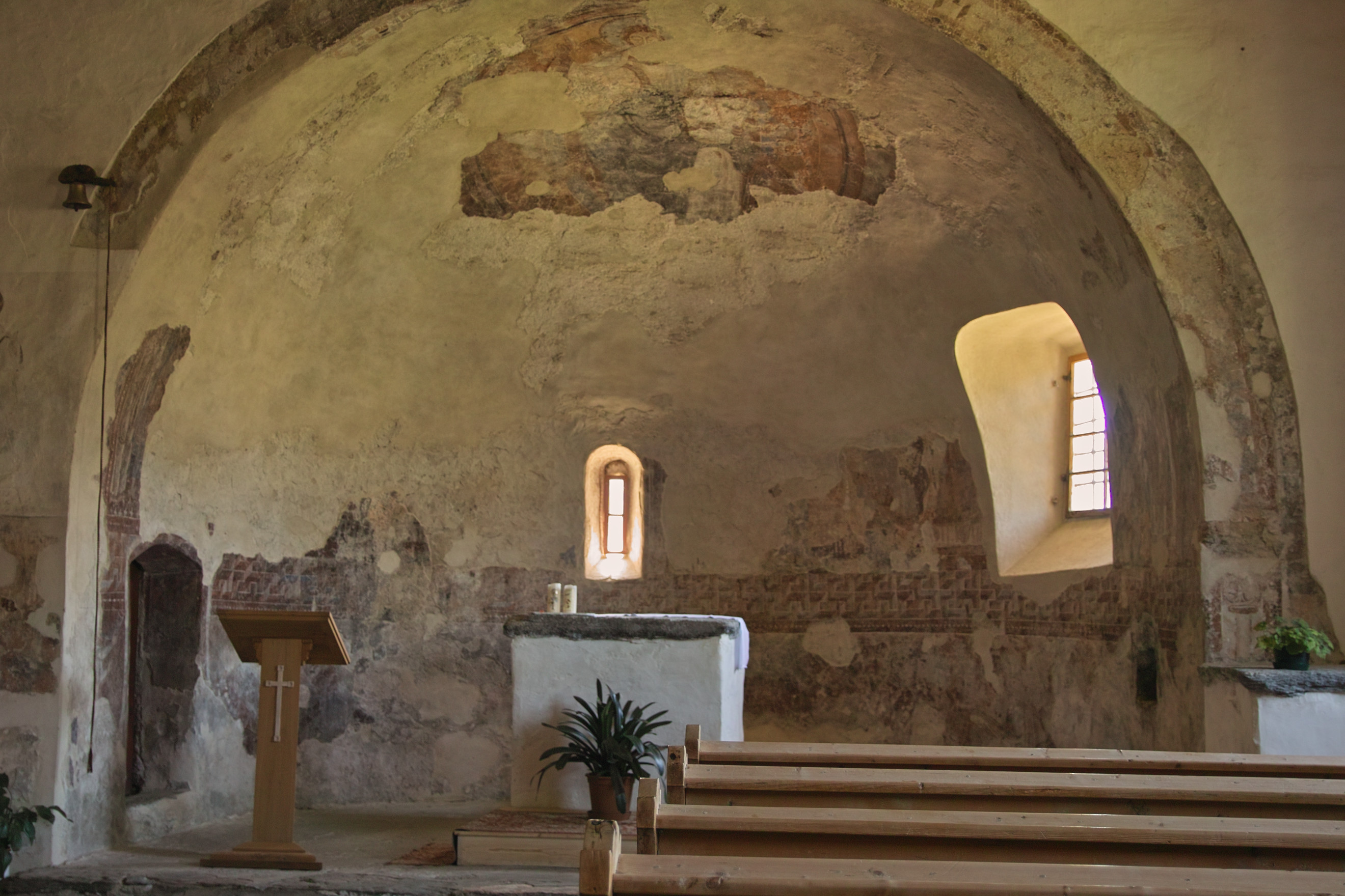 Apsis Kirche St. Veit am Bühel, Tartsch, Vinschgau, Südtirol, Italien. [1]